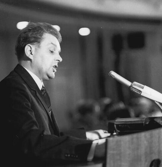 Zentralbild Franke 2.11.1966 Berlin: Prof. Hans Koch hielt Referat auf der Jahreskonferenz des Schriftstellerverbandes Prof. Hans Koch, Literaturwissenschaftler und Stellvertreter des Vorsitzenden des Deutschen Schriftstellerverbandes, referierte am 2.11.1966 auf der 1. Jahreskonferenz des Verbandes über "Probleme unserer sozialistischen Gegenwartsliteratur". An der Konferenz, die vom 2. bis 4.11.1966 in der Kongreßhalle am Berliner Alexanderplatz stattfindet, nehmen über 300 Schriftsteller, junge Autoren, schreibende Arbeiter, Literaturwissenschaftler und Bibliothekare teil.